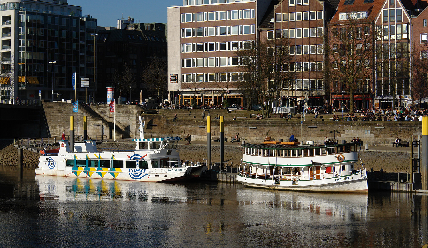 Schlachte in Bremen. Blick vom Teerhof, links die Bürgermeister-Smidt-Brücke, das Gastronomieschiff „Das Schiff“ und die historische „Friedrich“